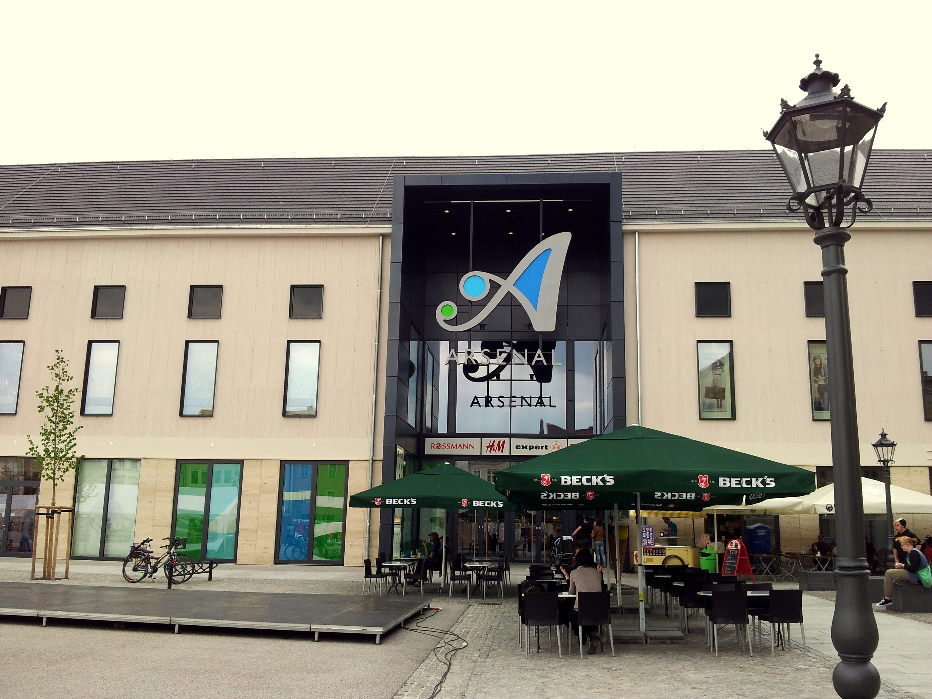 Das Arsenal in der Lutherstadt Wittenberg, Arsenalplatz